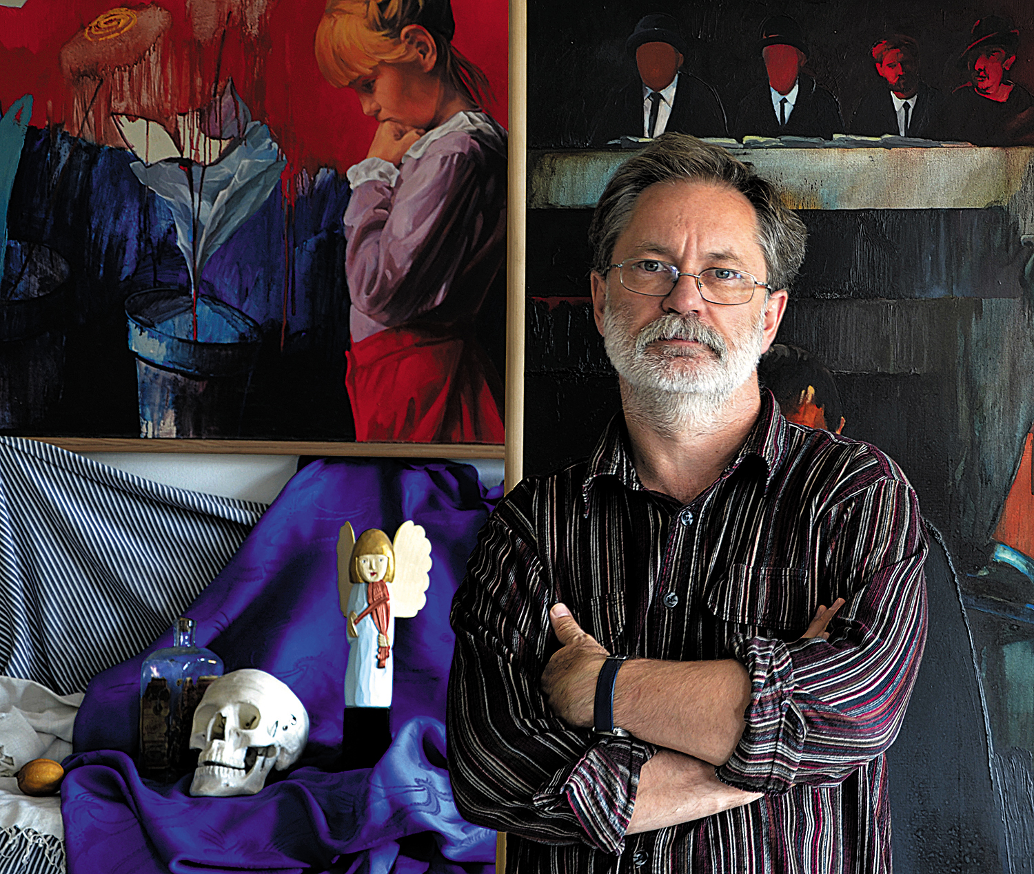 Artysta w pracowni